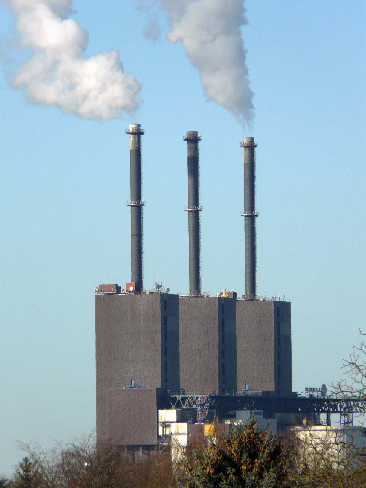 Kraftwerk Lichterfelde (Power Plant) von Osten aus gesehen